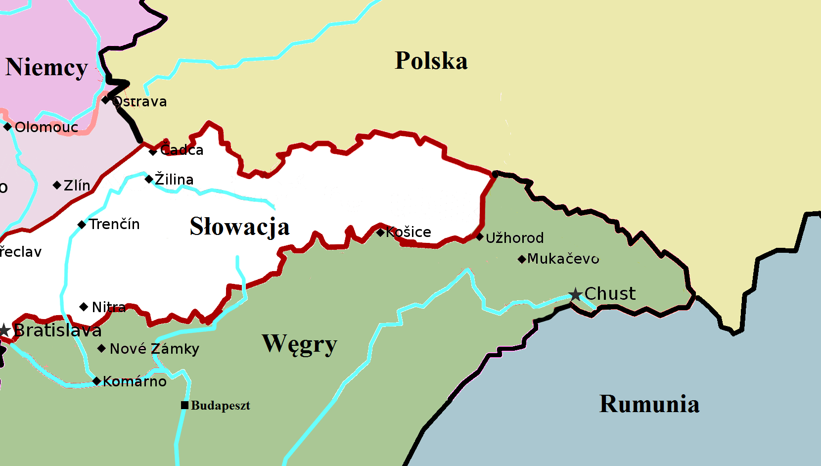 Europa latem 1939.